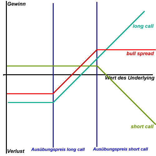 Bull spread mit calls.